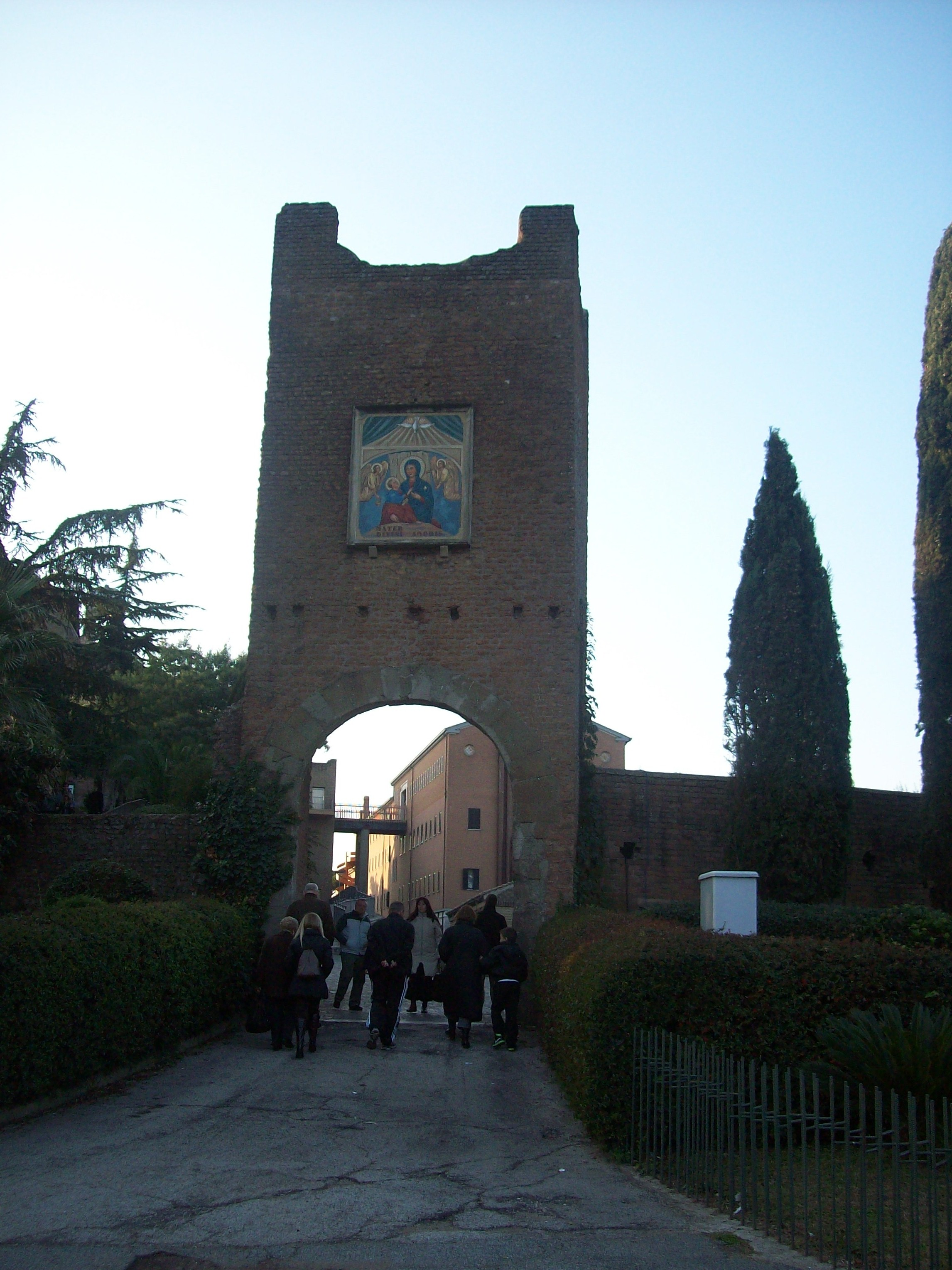 Roma, Santuario del Divino Amore - La torre dove avvenne il miracolo dei cani